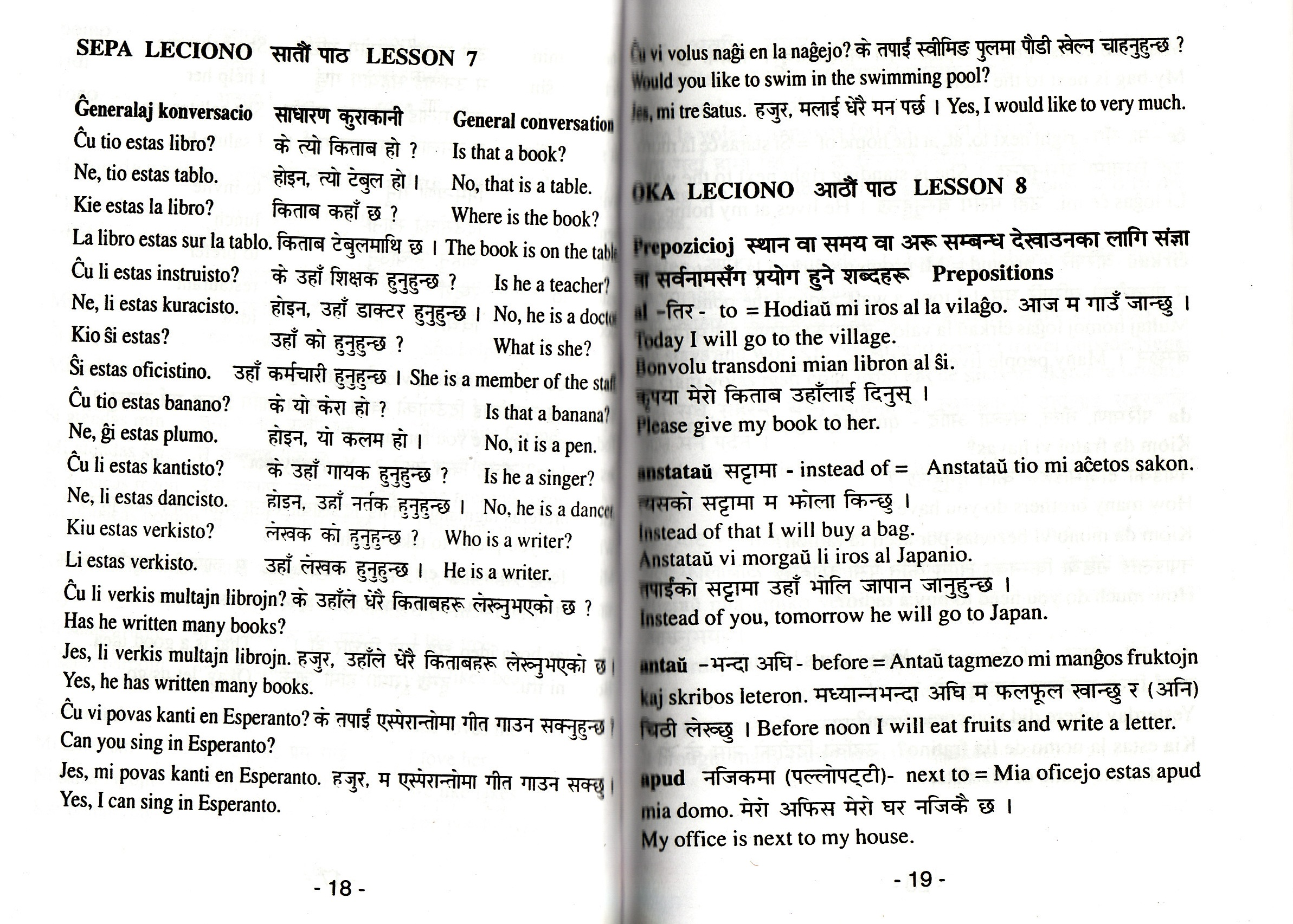 Esperanto apud Everesto, pages 18&19